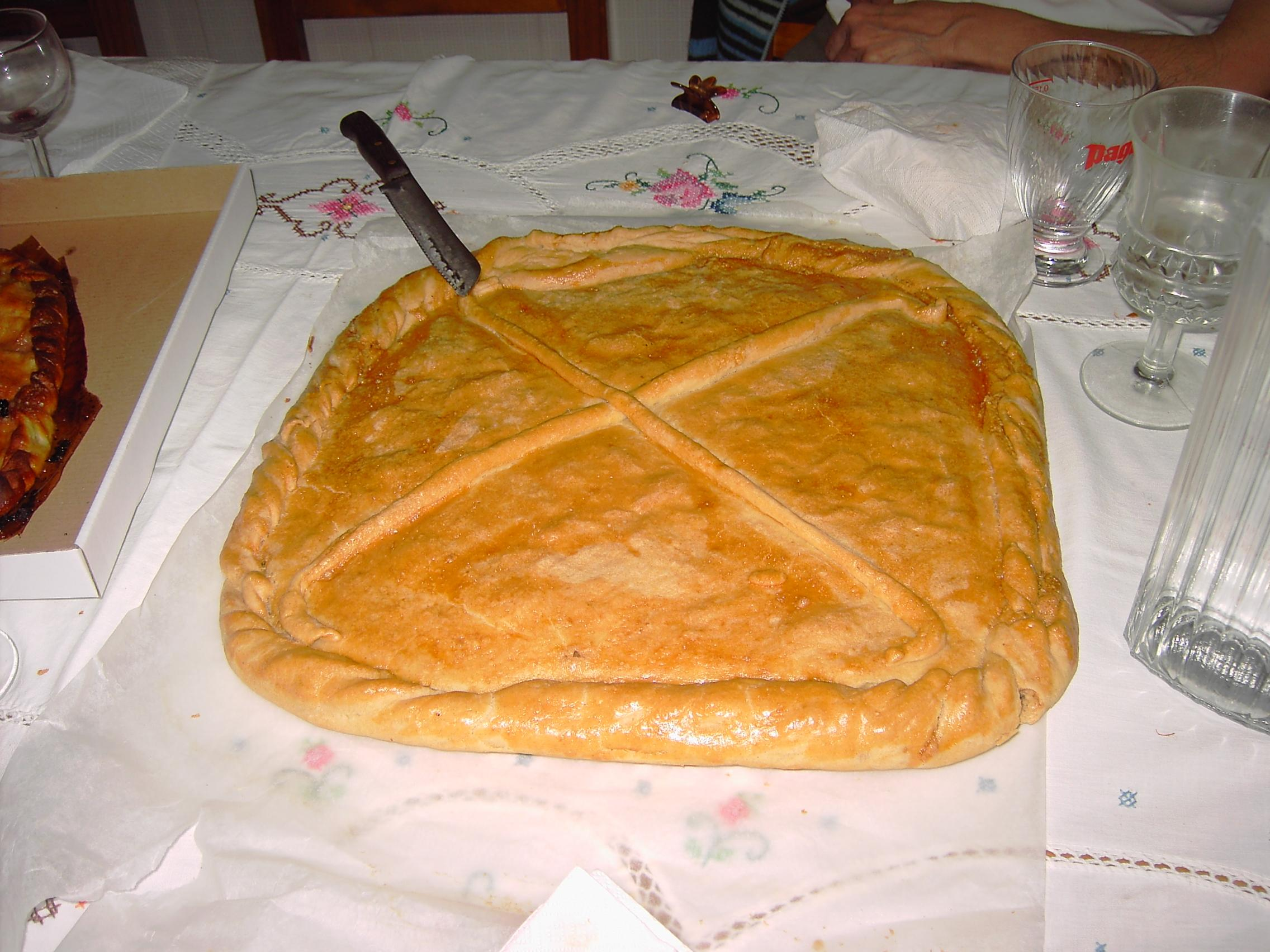 Una torta de Ribagorza, producto típico de la repostería altoaragonesa, que se elabora amasando harina con huevo, agua, aceite vegetal y levadura, aromatizando el conjunto con limón en una de sus versiones más recientes, o en el caso más tradicional, con frutos secos.